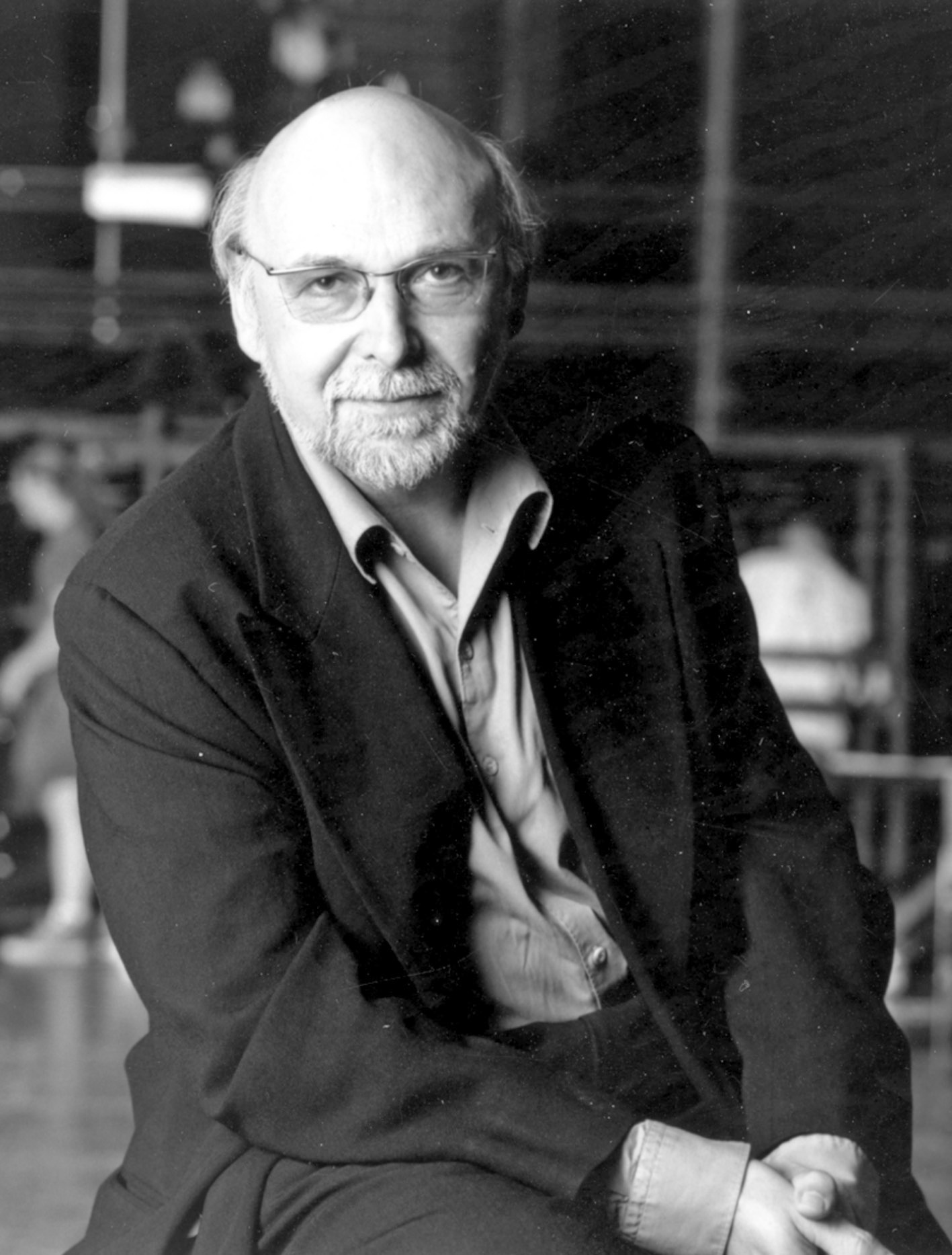 Portrait de Jean-Louis Martinoty le 7 novembre 2007 Ecrivain, essayiste, metteur en scène d'opéra, Directeur de l'Opéra de Paris 1986-1989